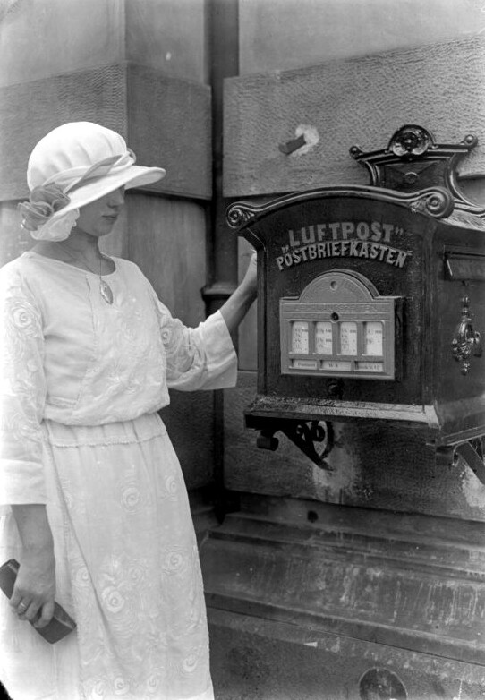 Der erste Luftpost-Briefkasten. Eine Neuerscheinung in den Straßen Berlins.